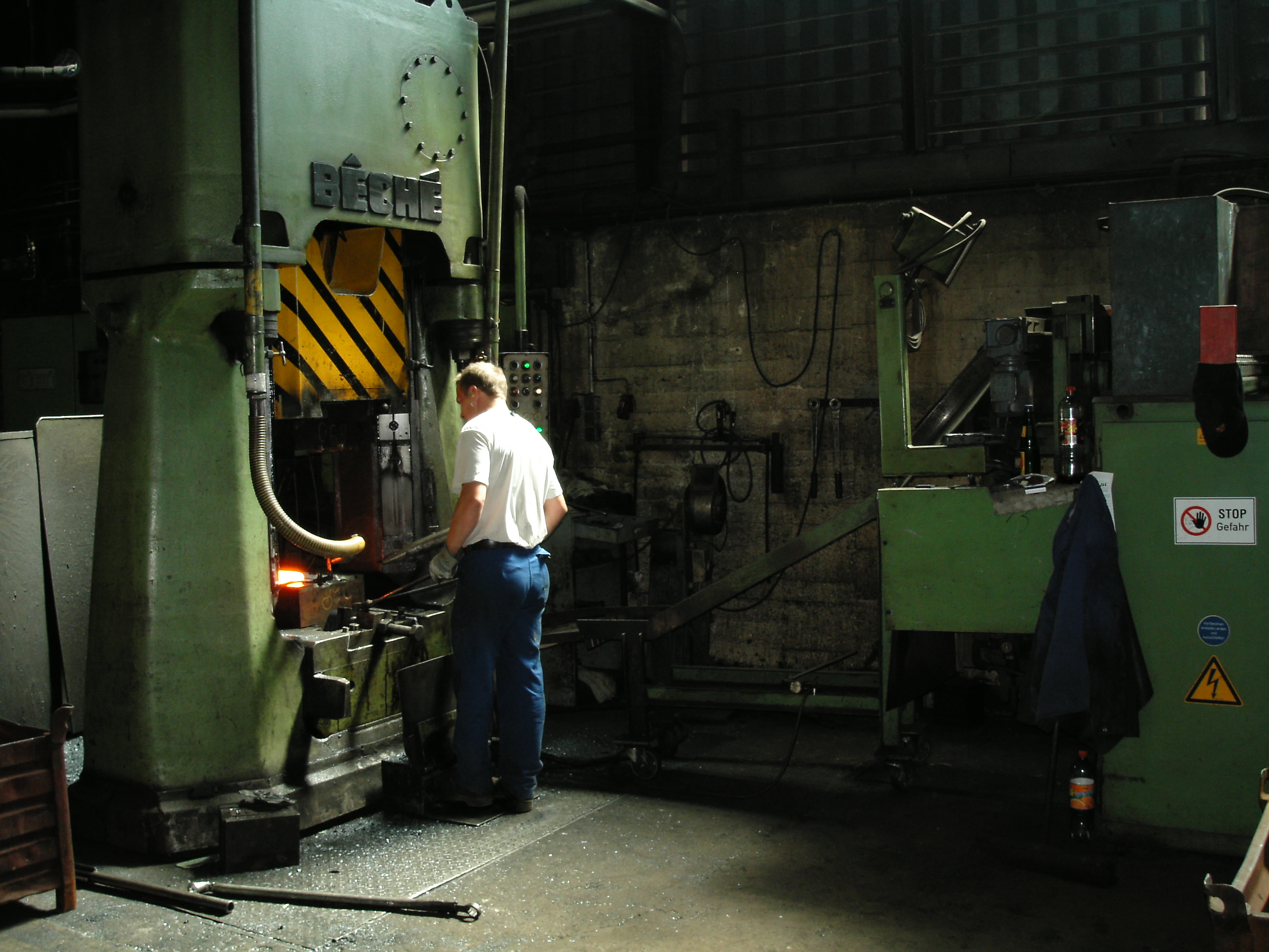 Gesenkschmiede mit Oberdruckhammer Beche